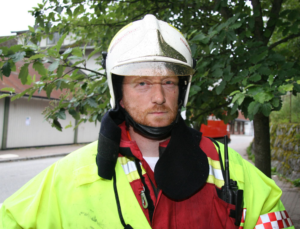 John Arne Karlsen, brannsjef ved Eidsvoll- og Hurdal brannvesen